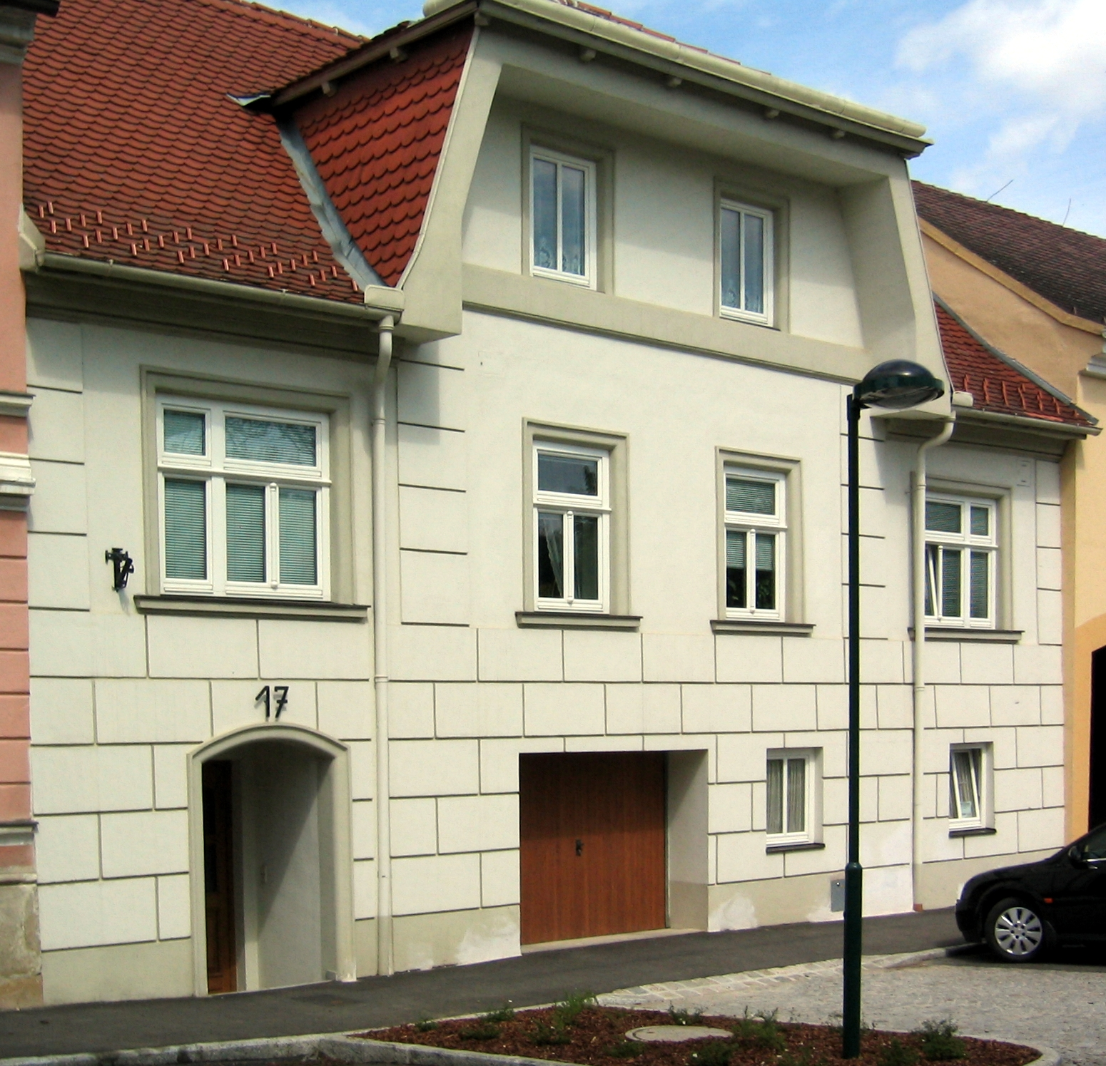 Sitzendorf Hauptplatz 17